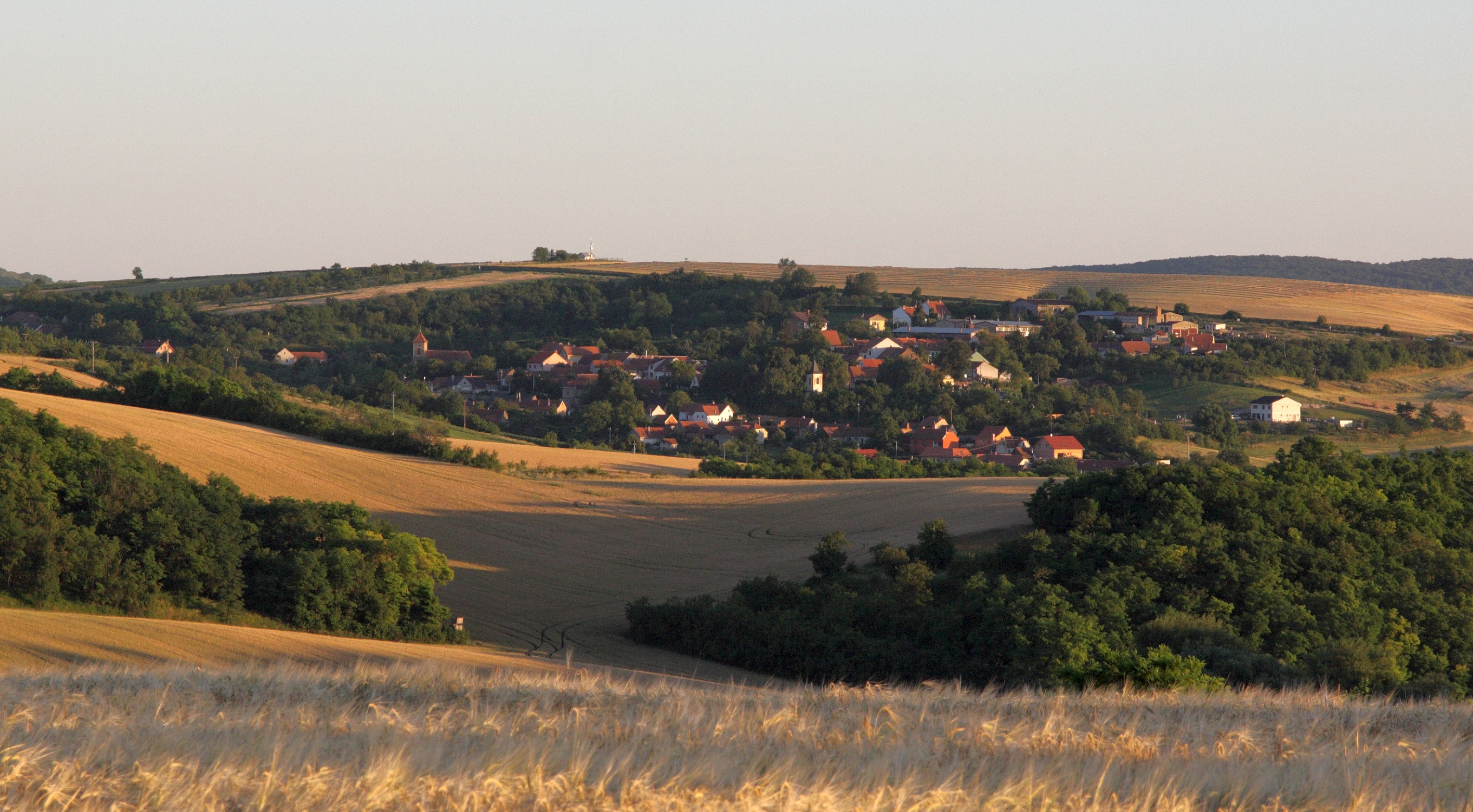 Borkovany - pohled od severu.